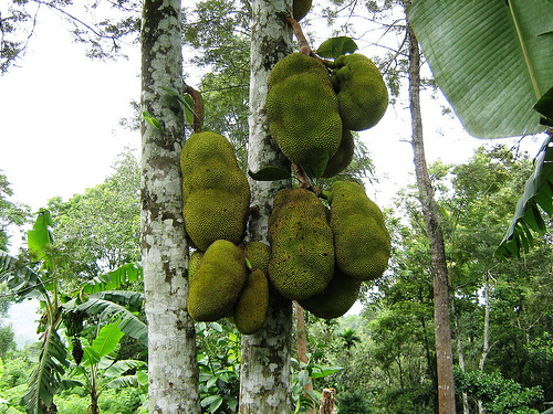 Kerala Agricultural University, Ambalavayal, Kerala, India.